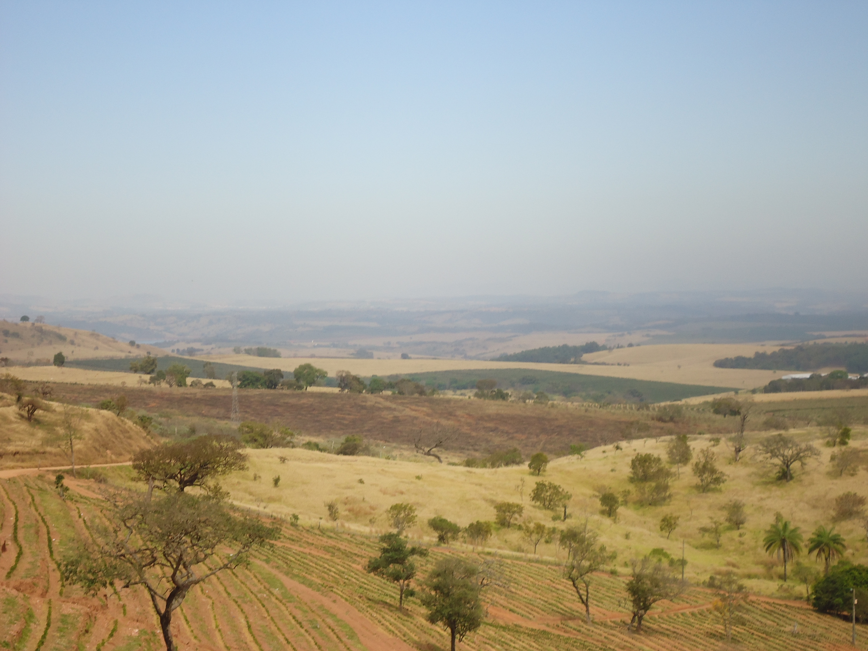 Paisagem de Três Pontas mostrando a vegetação seca em virtude da estiagem.